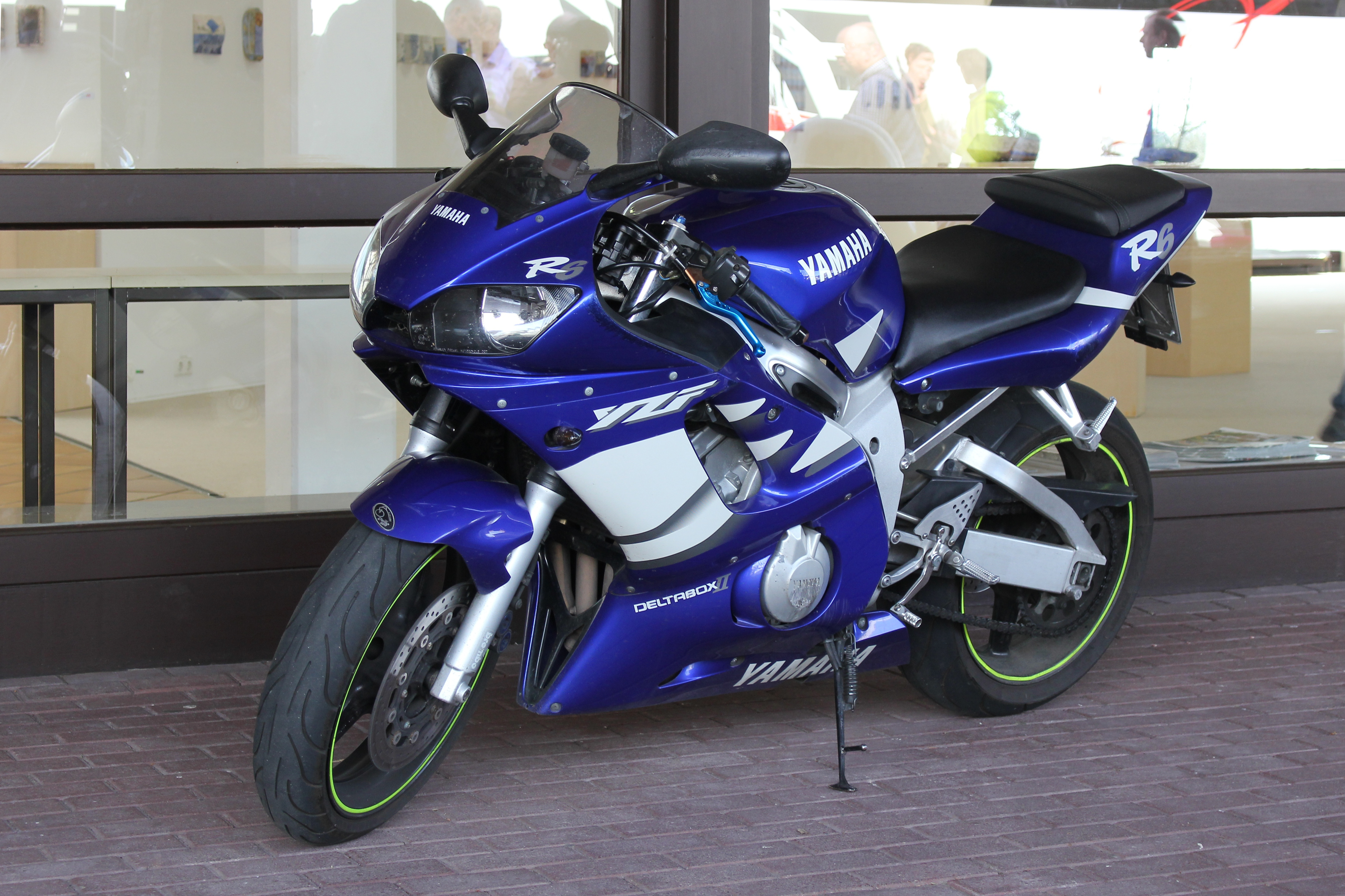 Yamaha R6 K265, 35 kW, Modell 2003